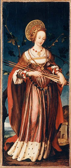 Hans Holbein der Jüngere: Ursula, 1523, in der Staatlichen Kunsthalle in Karlsruhe.